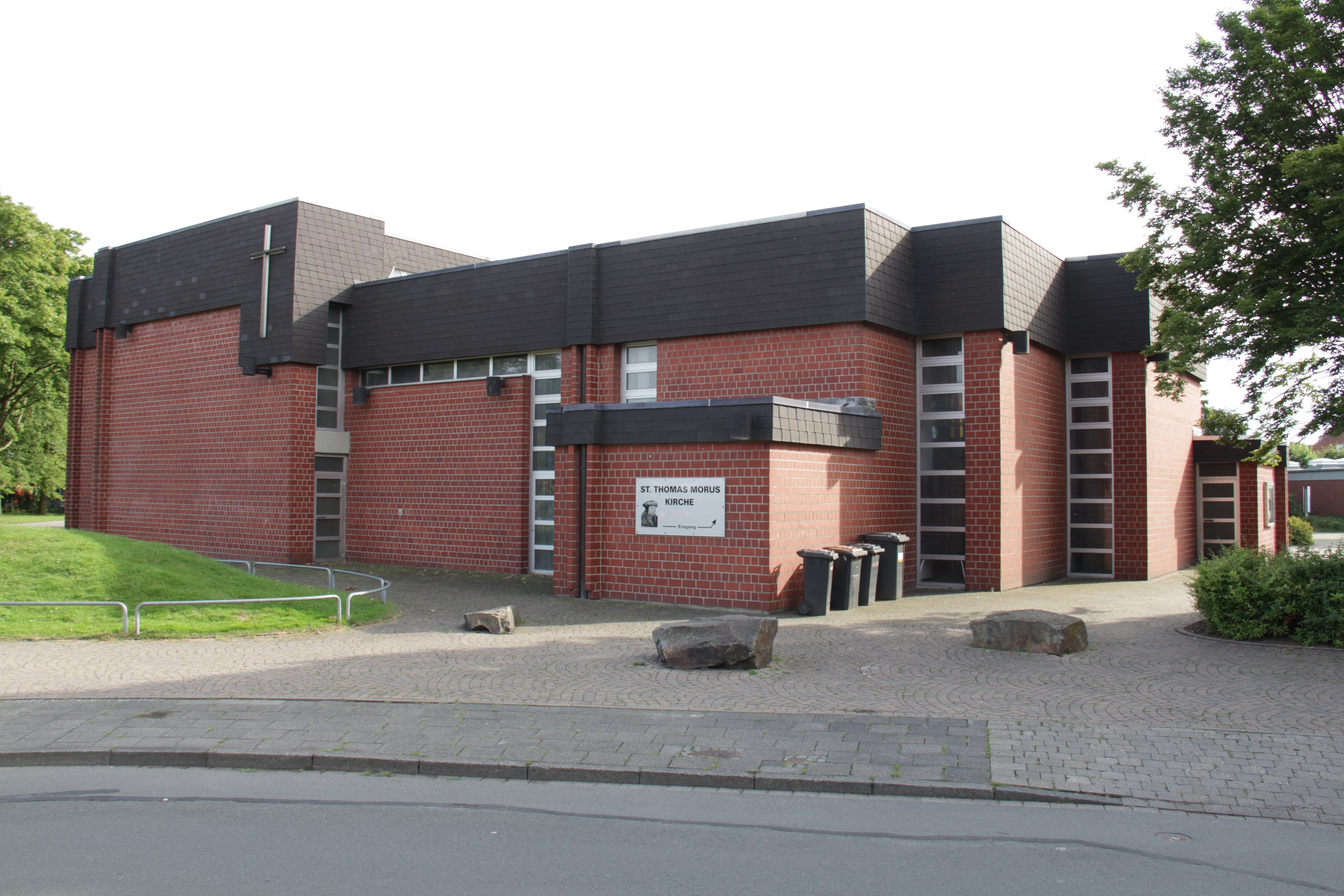 St. Thomas Morus Kirche in Münster, Stadtteil Rumphorst